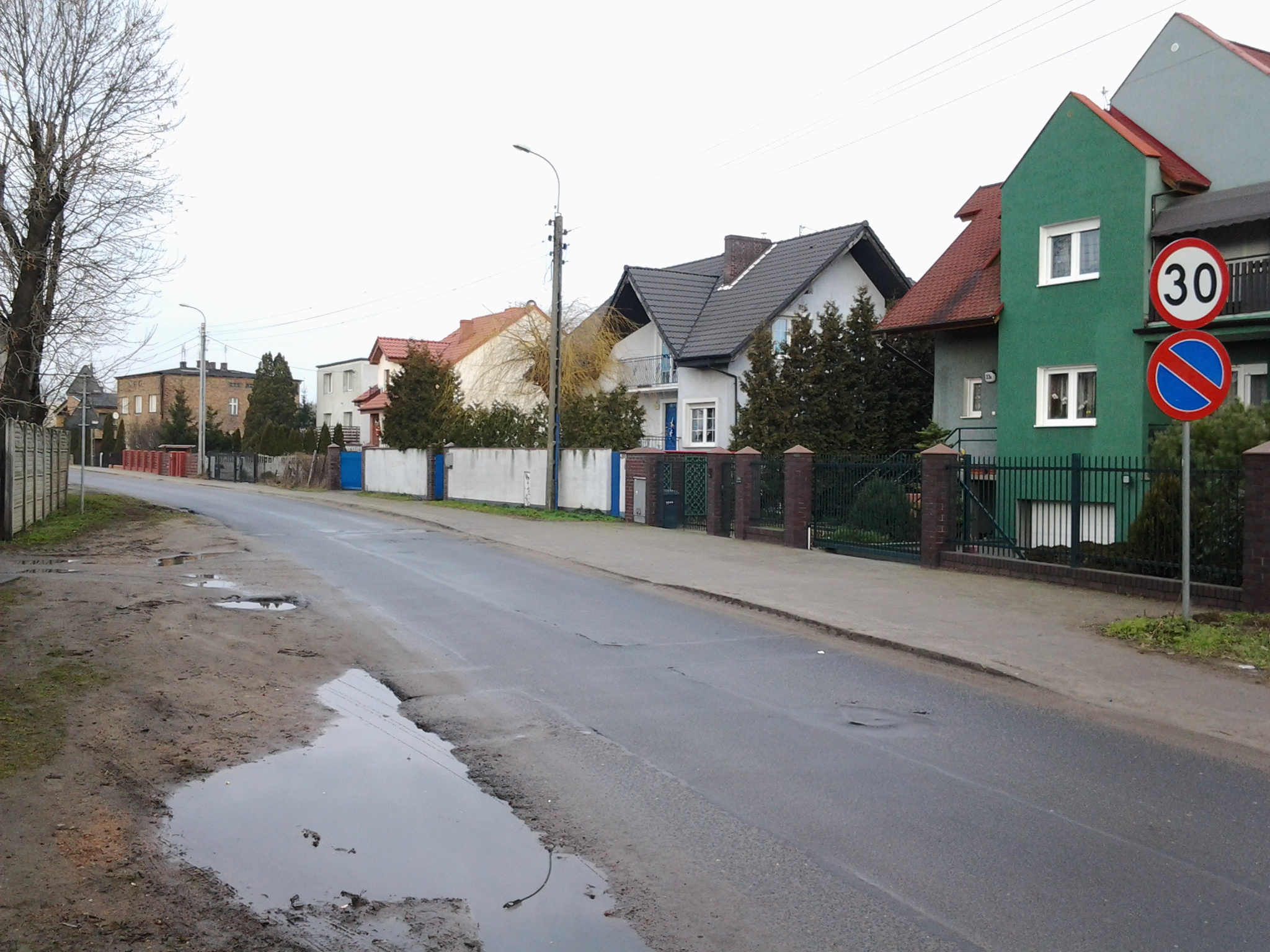 Rejon ulic Junikowskiej, Wieruszowskiej i Bełchatowskiej w Poznaniu. Dawny ośrodek wsi Junikowo.